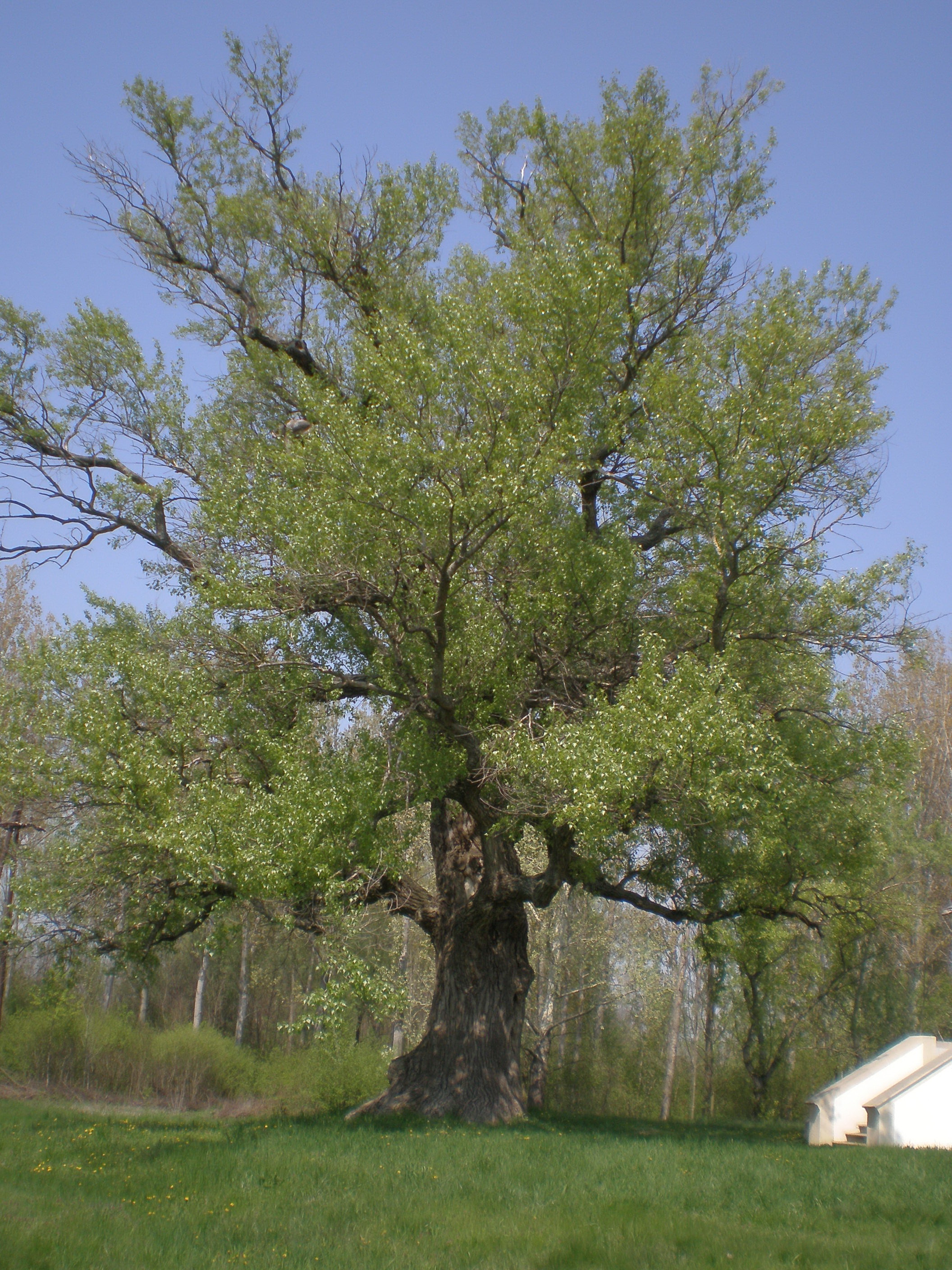 Ásványráró határában álló emlékfa, a Szigetköz legidősebbként számon tartott fekete nyára (Ásványráró, Győr-Moson-Sopron megye, Magyarország)